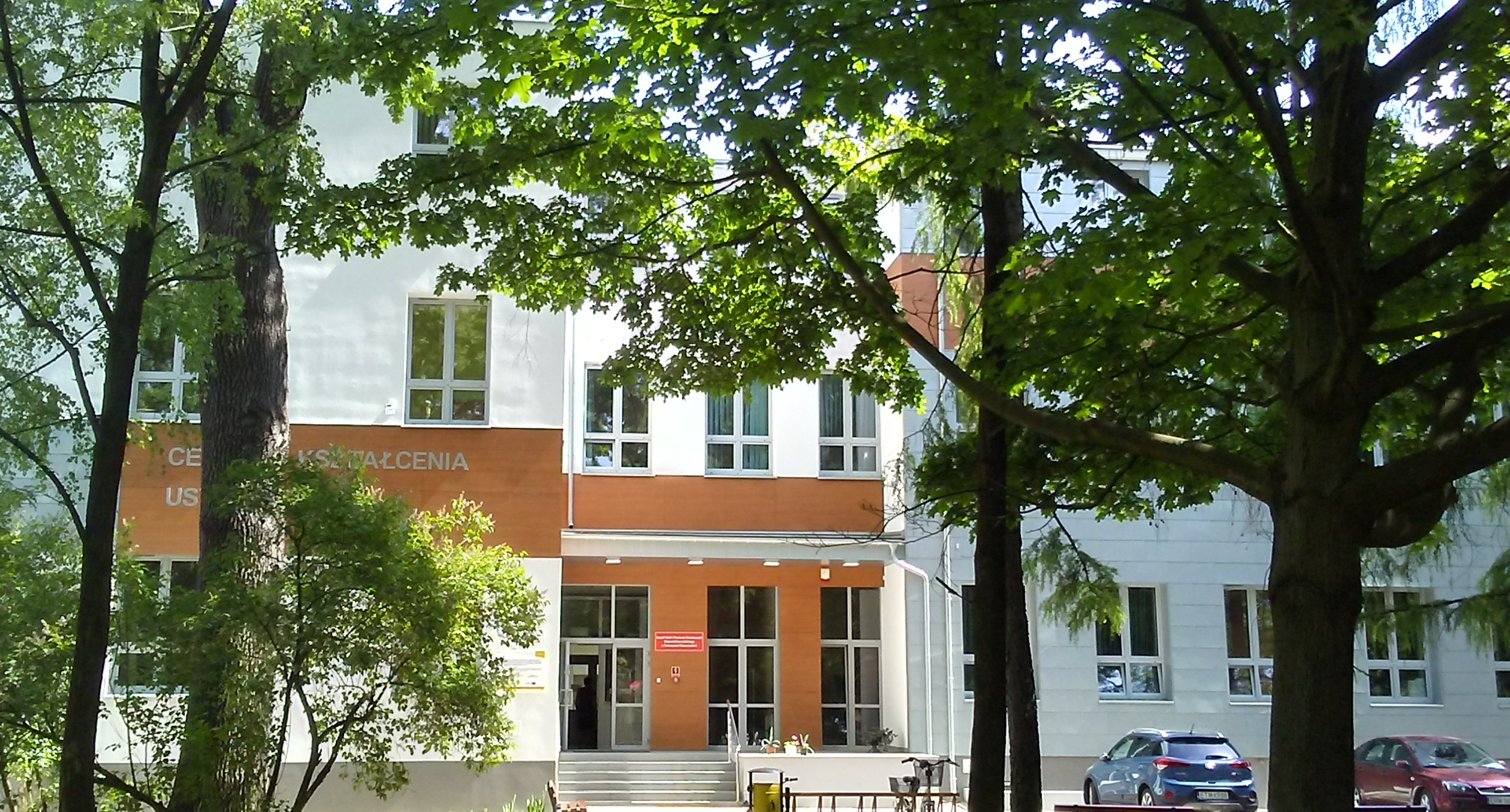 Centrum Kształcenia Ustawicznego (dawny Medyk), przy ulicy św.Antoniego 47 w Tomaszowie Mazowieckim